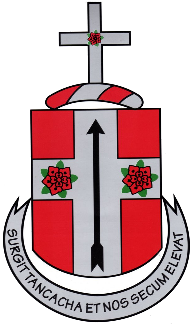 Escudo de Tancacha, una localidad en la provincia de Córdoba, departamento Tercero Arriba, Argentina.